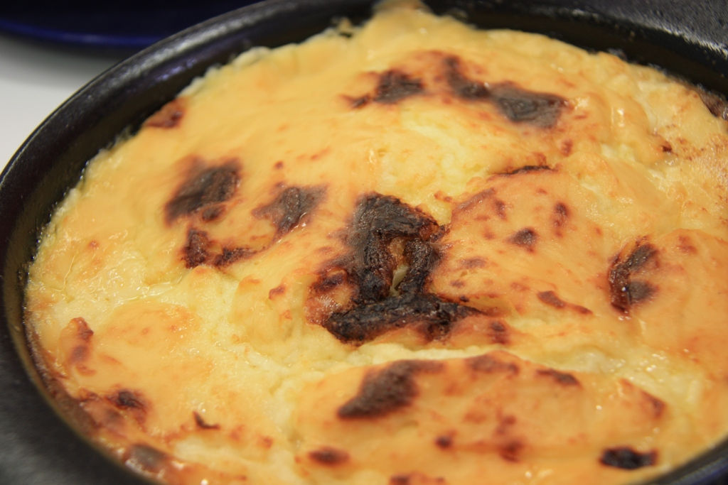 Ver artículo en mi Blog en Enlace See post in My blog at Link